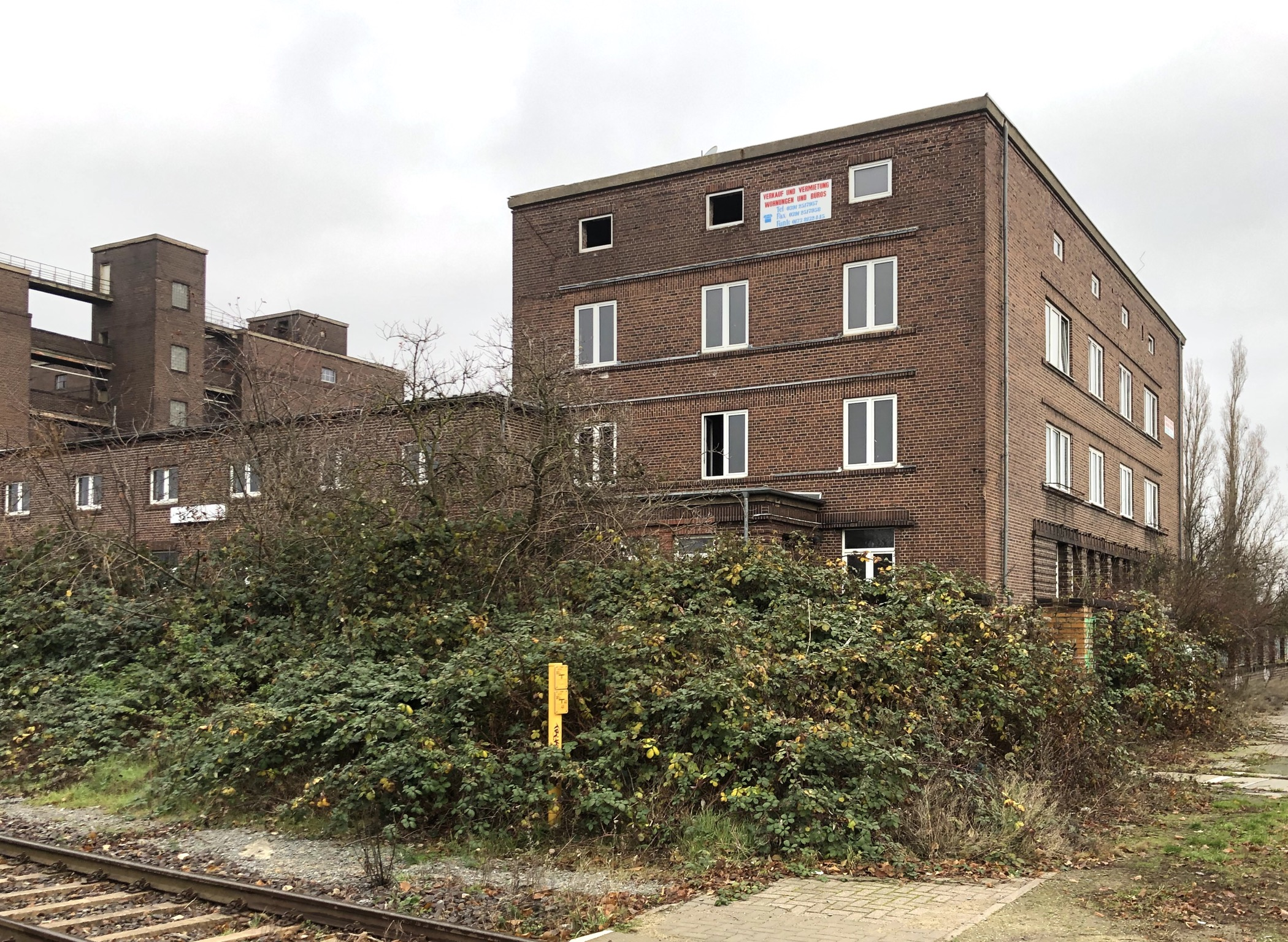 Konsummühle Magdeburg Wohn und Verwaltungsbau Straßen Seite